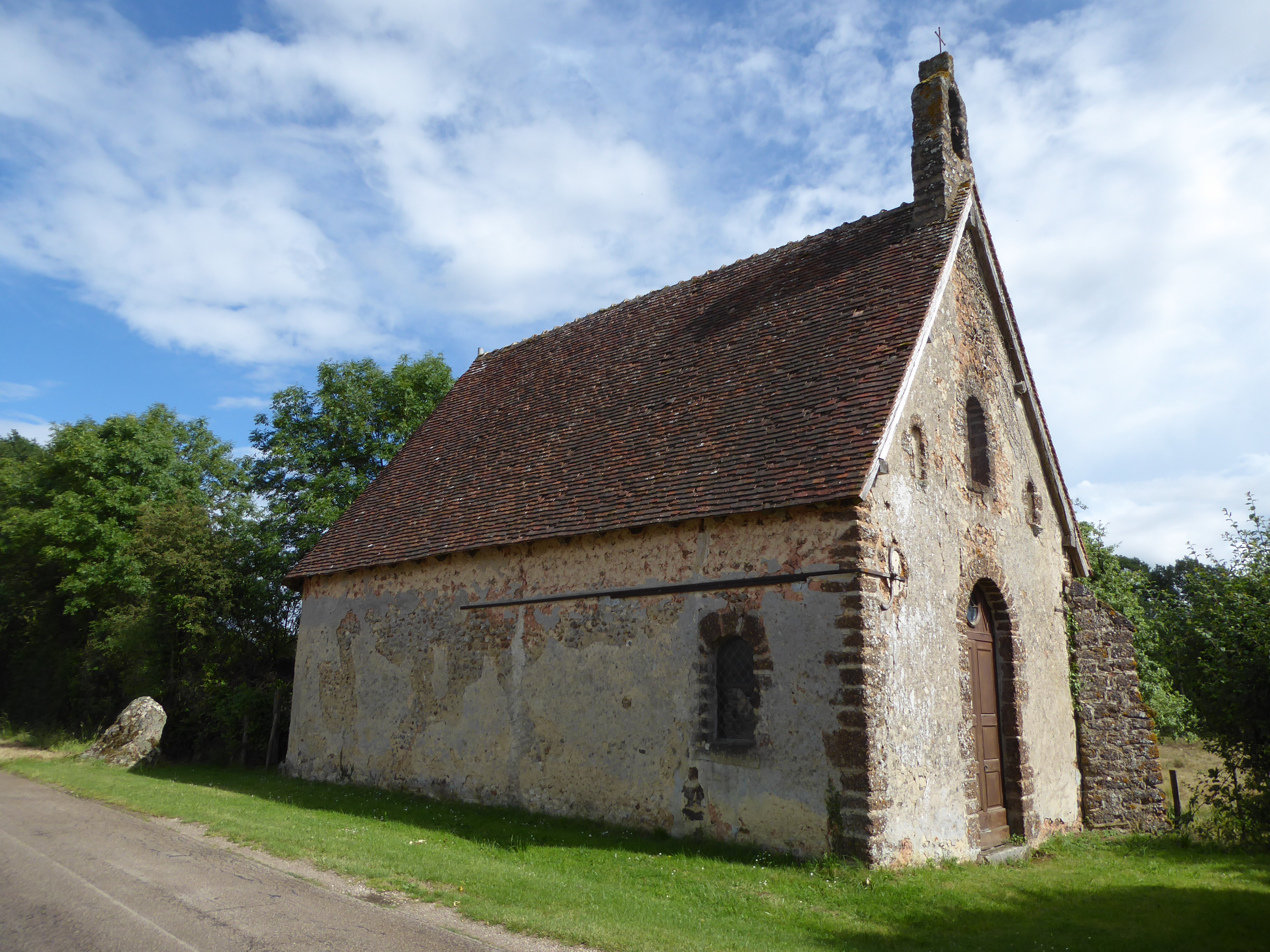 Chapelle Saint-Benoît, Arrou, Eure-et-Loir, France.